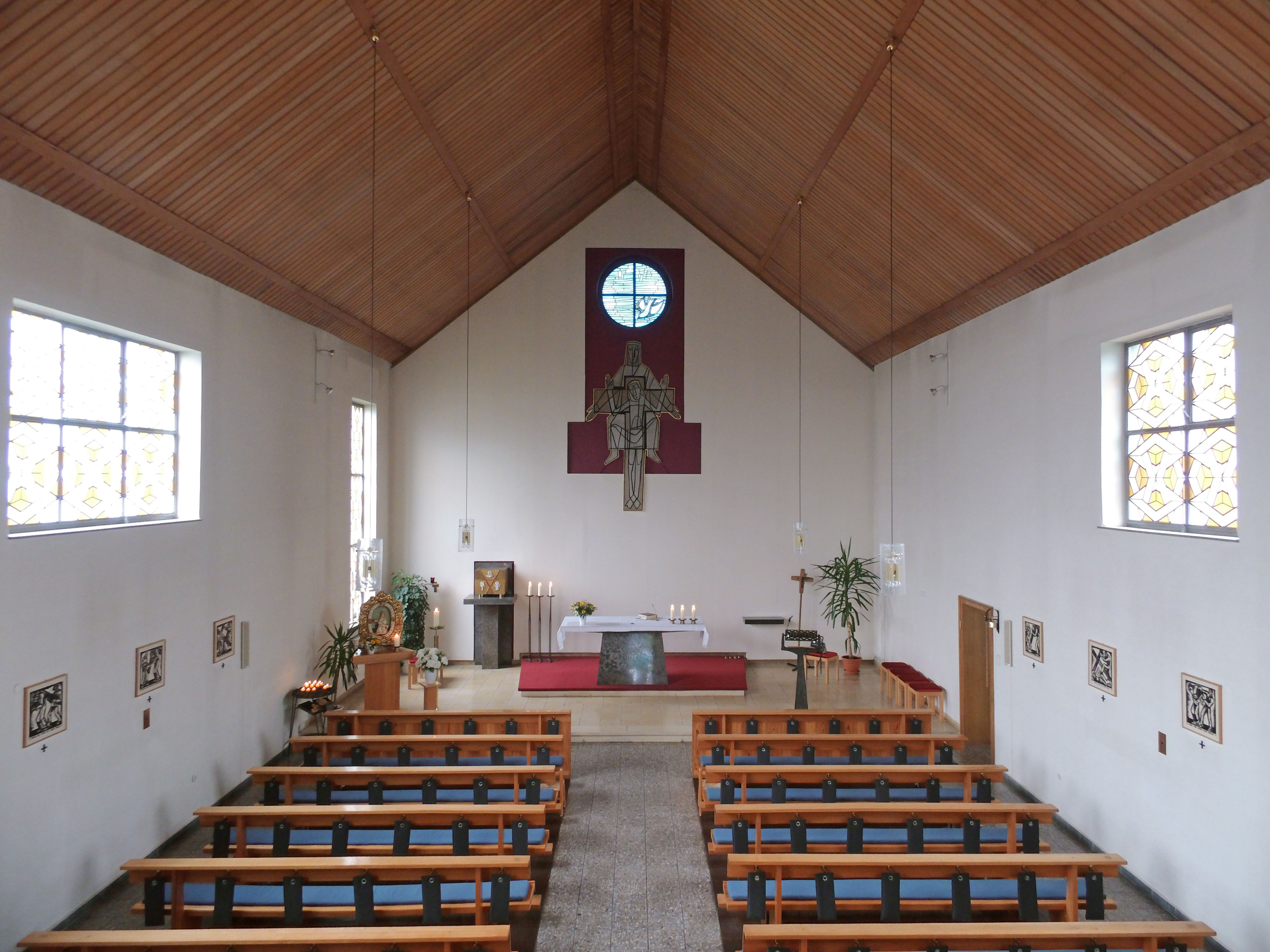 Katholische Kirche "Heilige Dreifaltigkeit" in Hämelerwald (Stadtteil von Lehrte)